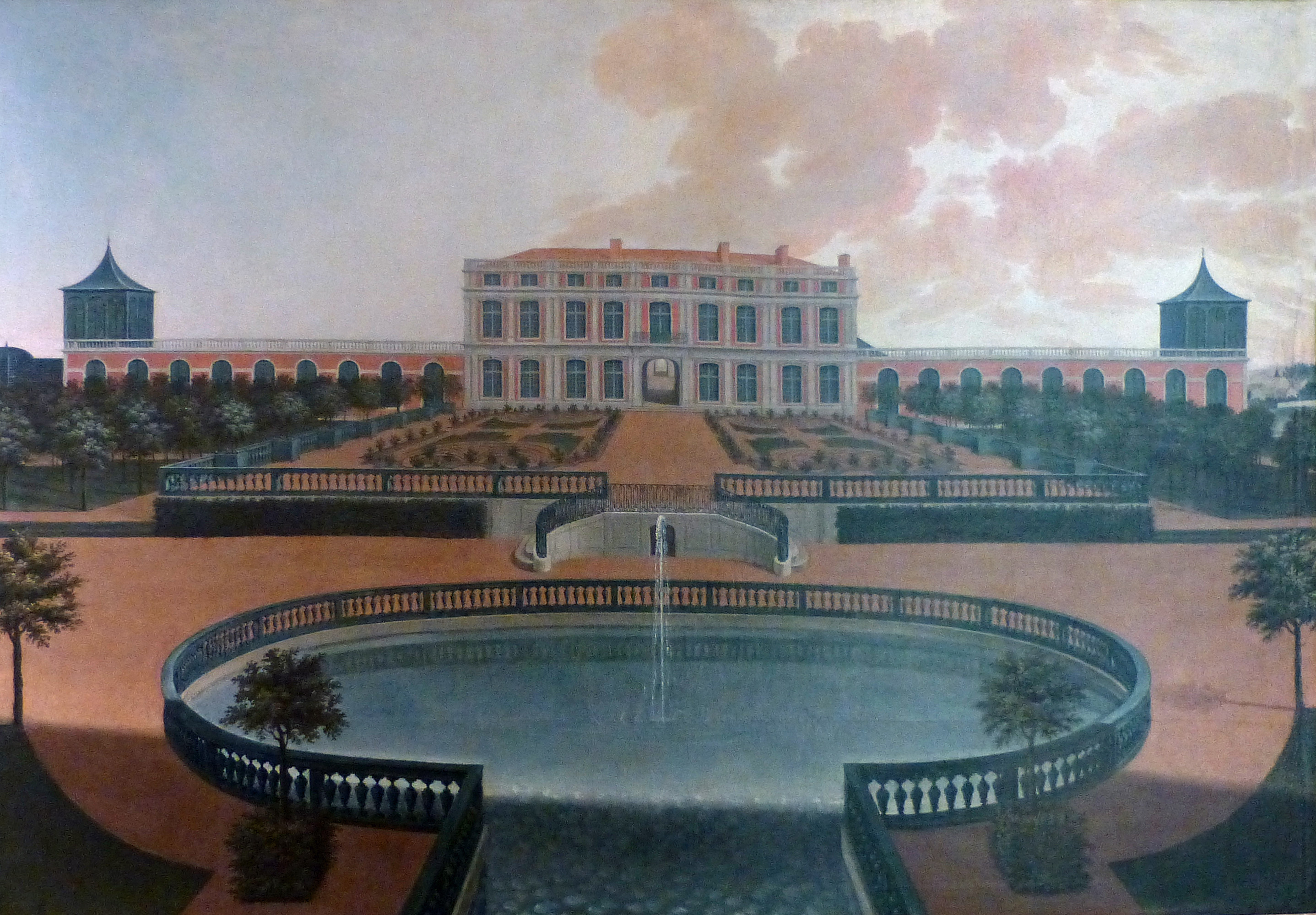 André Joly (d'après), Château royal d'Einville-au-Jard, Musée Lorrain